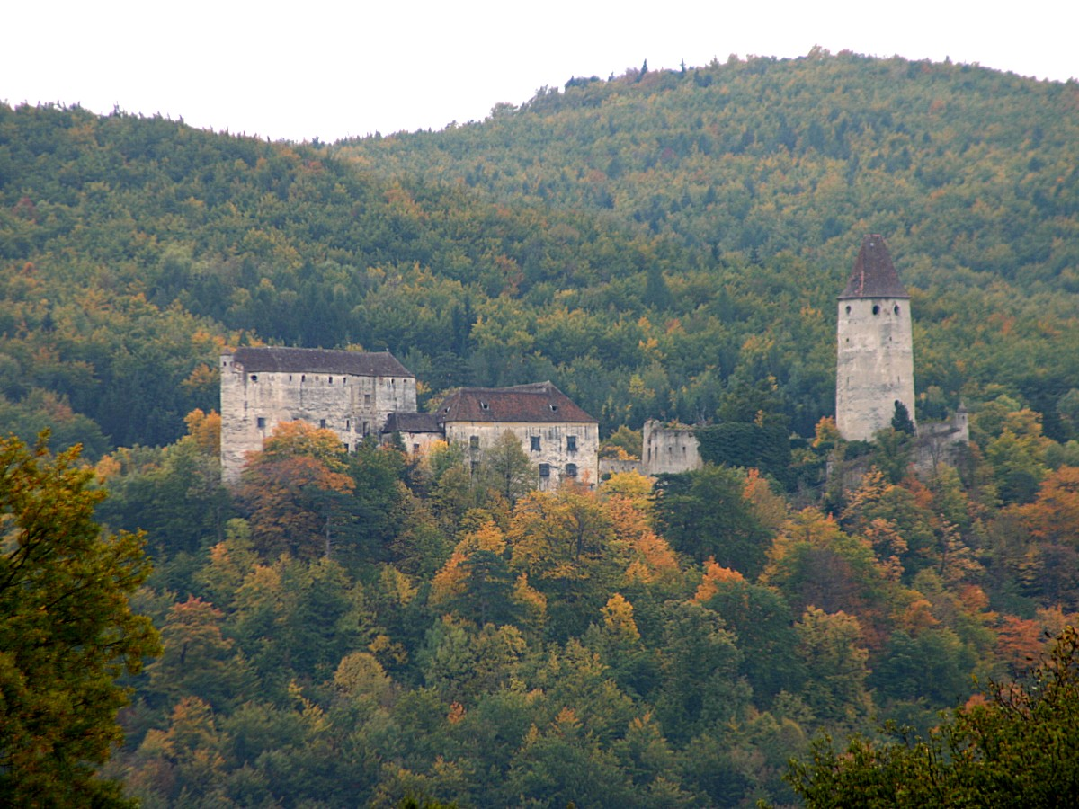 Seebenstein Burg (Bild 1)